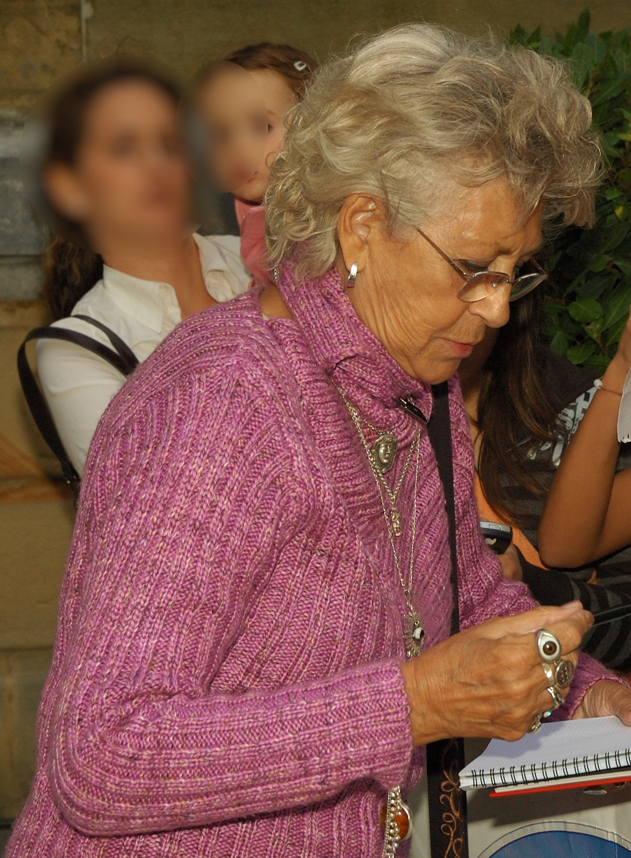 pilar bardem 2005